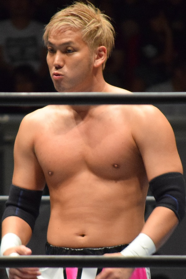 2016年9月25日 ワールド記念ホール「DESTRUCTION in KOBE」 小峠篤司